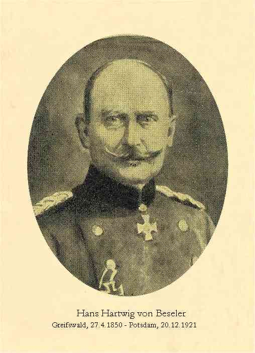 Hans Hartwig von Beseler (1850-1921), generale tedesco della I Guerra Mondiale